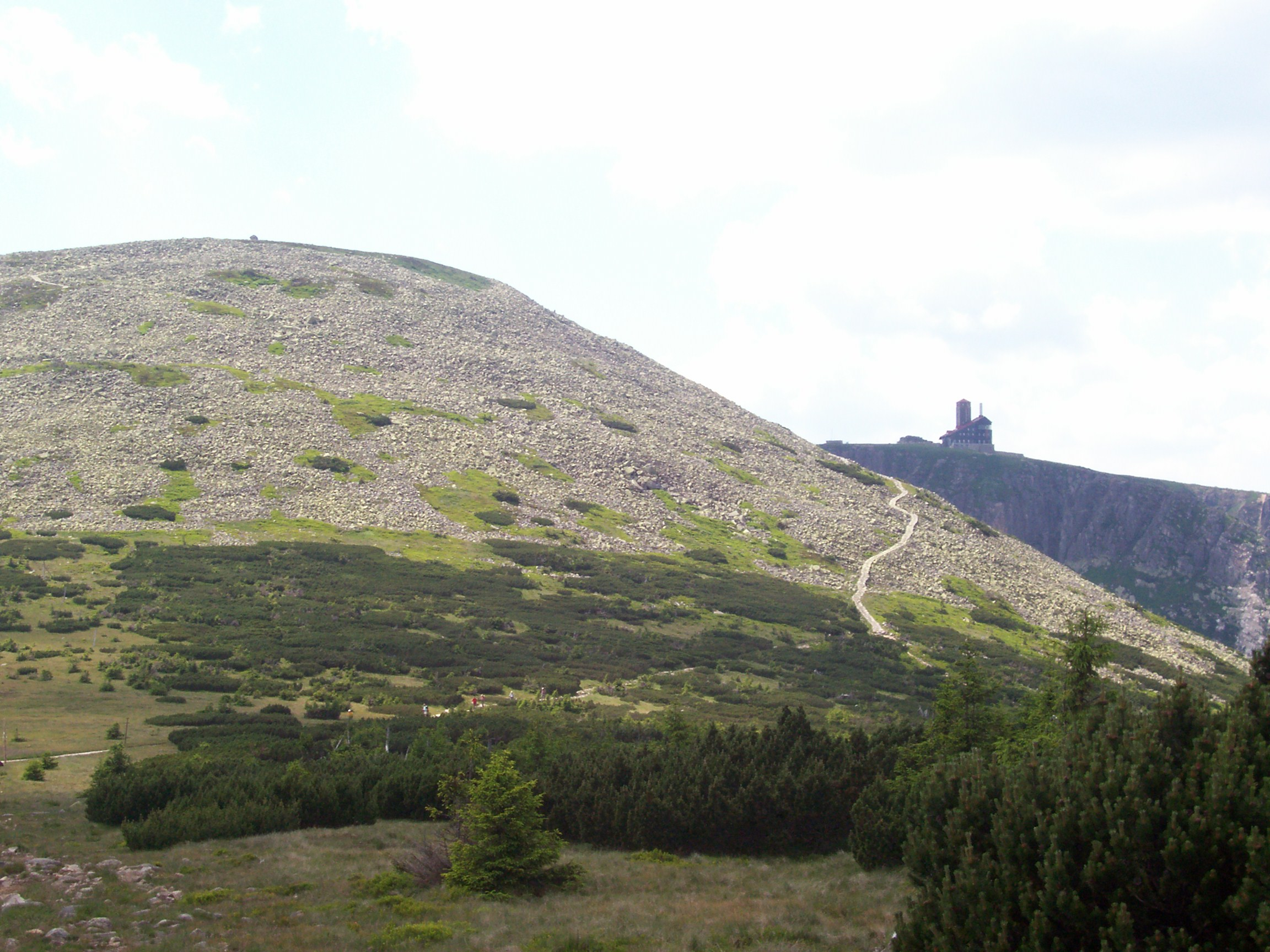 Na pierwszym planie Wielki Szyszak, z tyłu stacja na Śnieżnych Kotłach (Karkonosze, Polska)